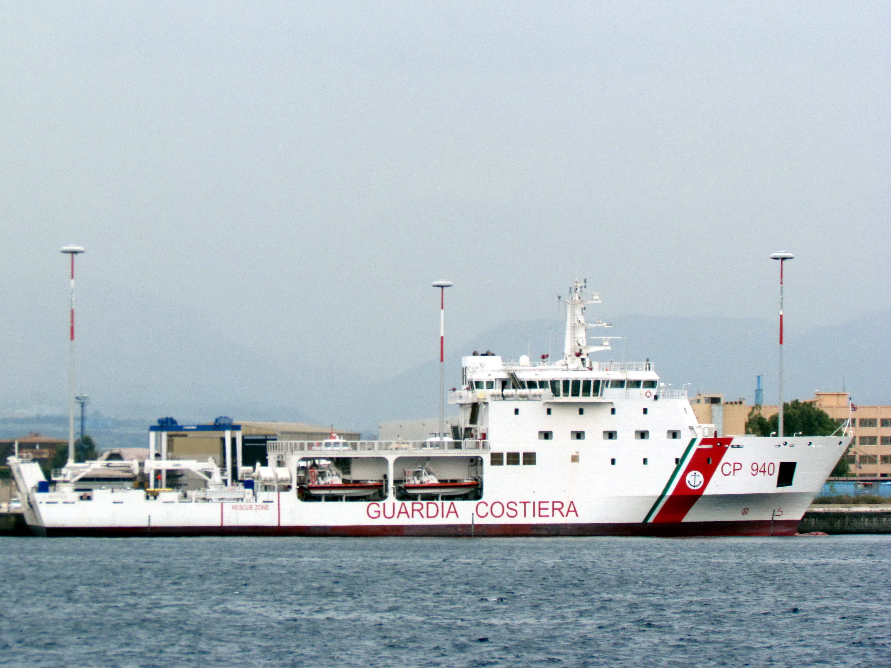 Il pattugliatore della Guardia Costiera Dattilo ormeggiato a Messina